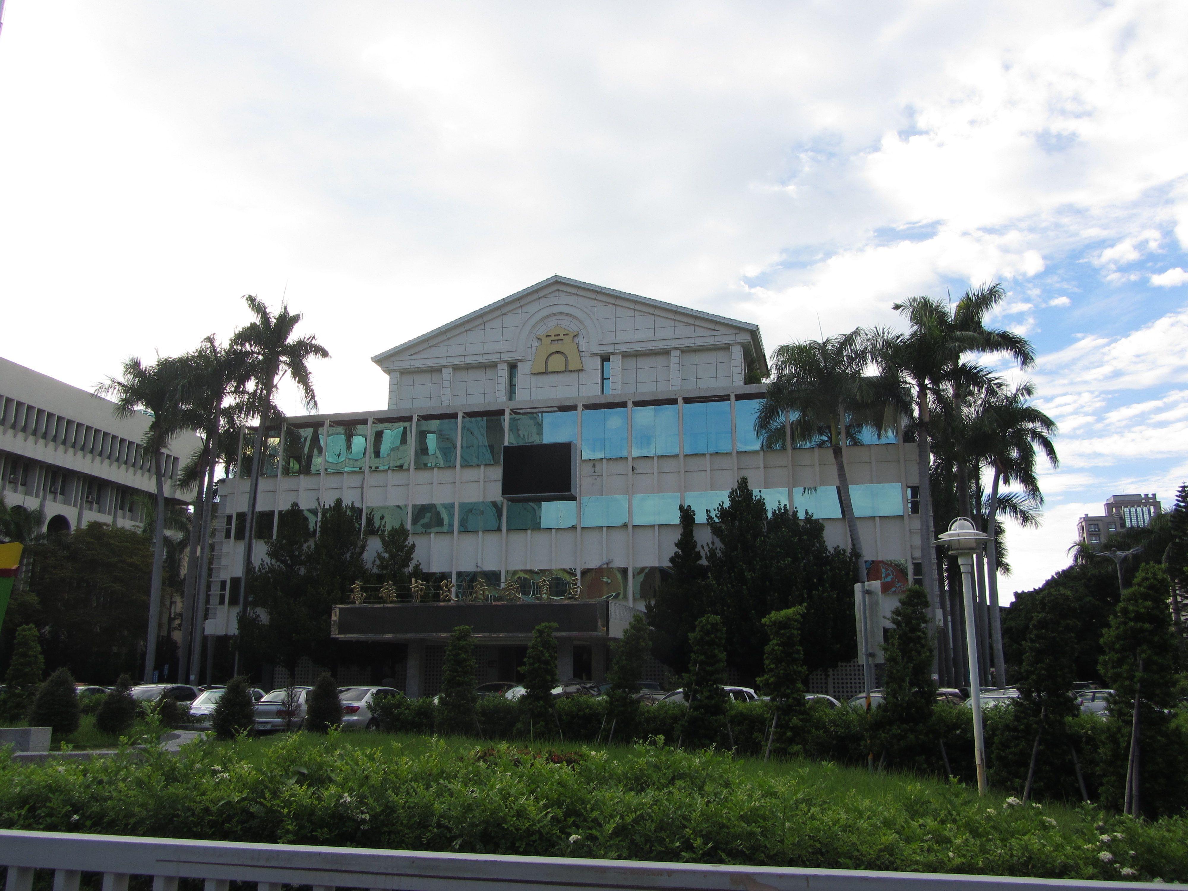 高雄市議會舊址，拍攝時為高雄市政府教育局使用。